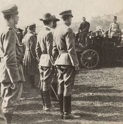 Generał Rajmund Baczyński przemawia do legionistów z 2 Pułku Piechoty Legionów Polskich przed przysięgą na Błoniach Krakowskich.